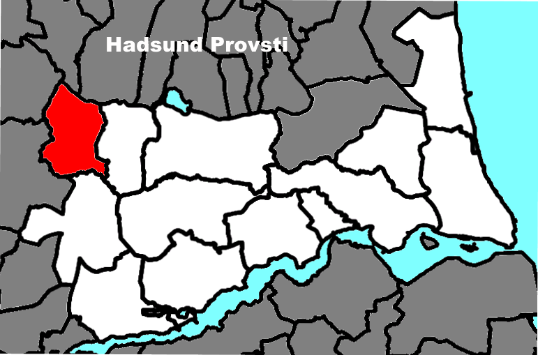 Sognets beliggenhed i Hadsund Provsti.